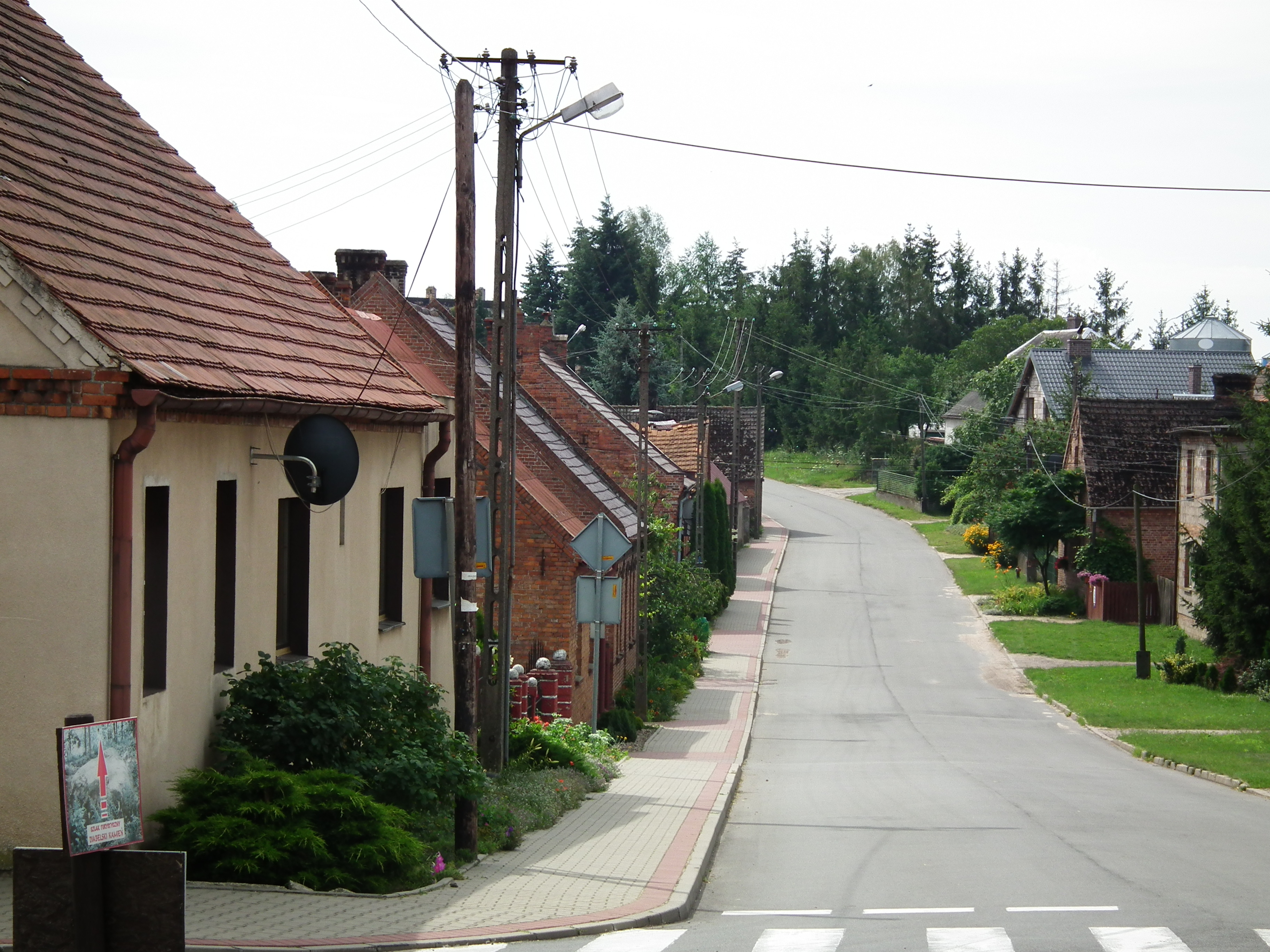 Lutom - centralna ulica.